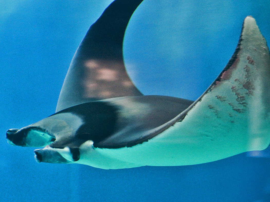 گونه ای از پرتوماهی اقیانوس اطلس